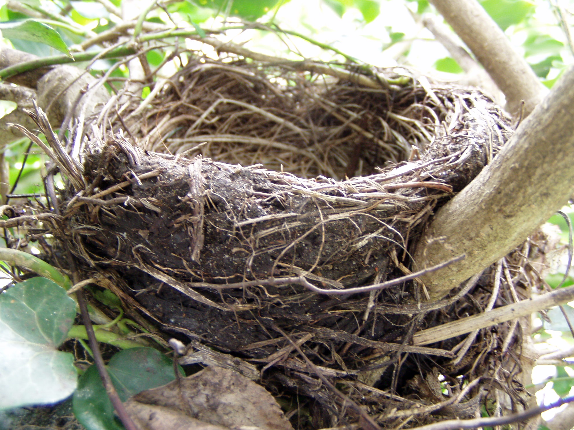 Merelnest, nu van de buitenkant. Zelf gemaakt.